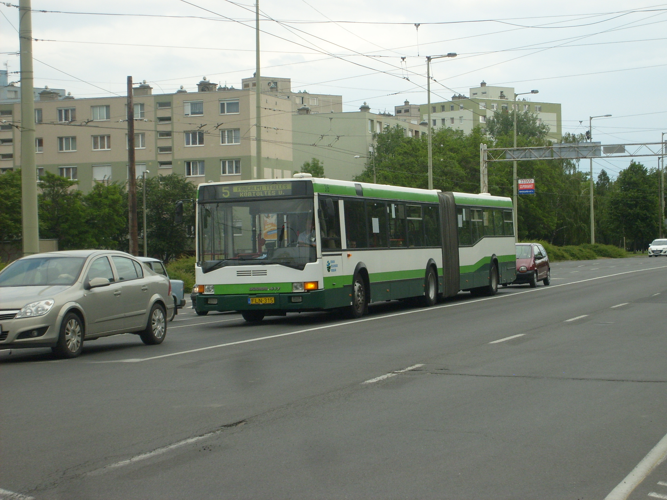 SZKT-s Ikarus 417 Szegeden